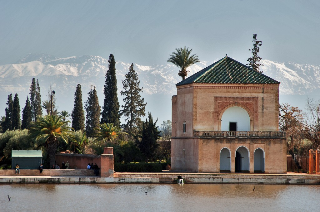 Pavillion in den Menaragärten, dahinter das Atlasgebirge